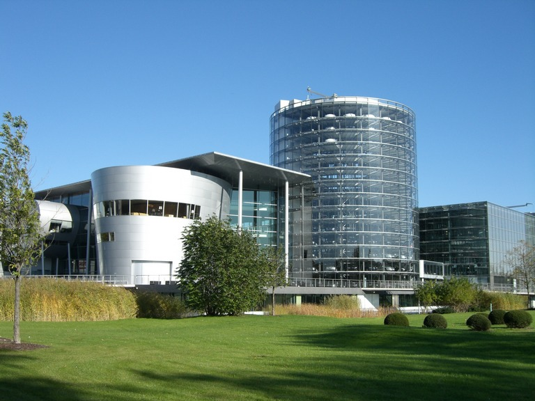 Dresden Großer Garten - Gläserne Manufaktur